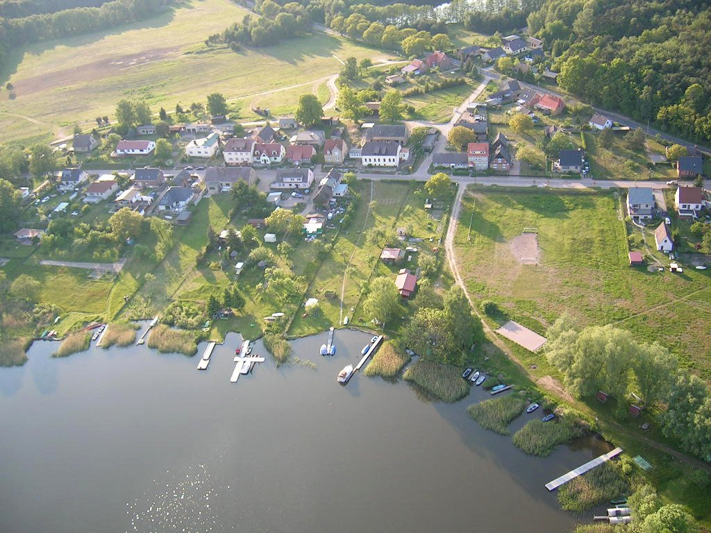 Luftbild mit Blick Richtung Norden auf Zwenzow, Ortsteil der Gemeinde Userin in Mecklenburg-Vorpommern.